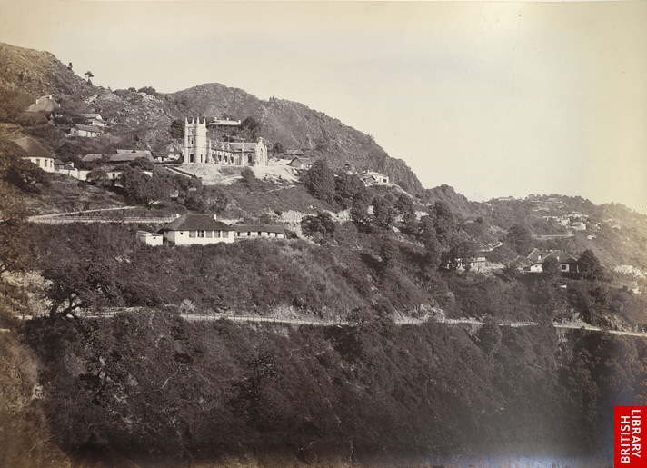 Mussoorie, distant view, Dehradun district, Uttarakhand, 1865.jpg